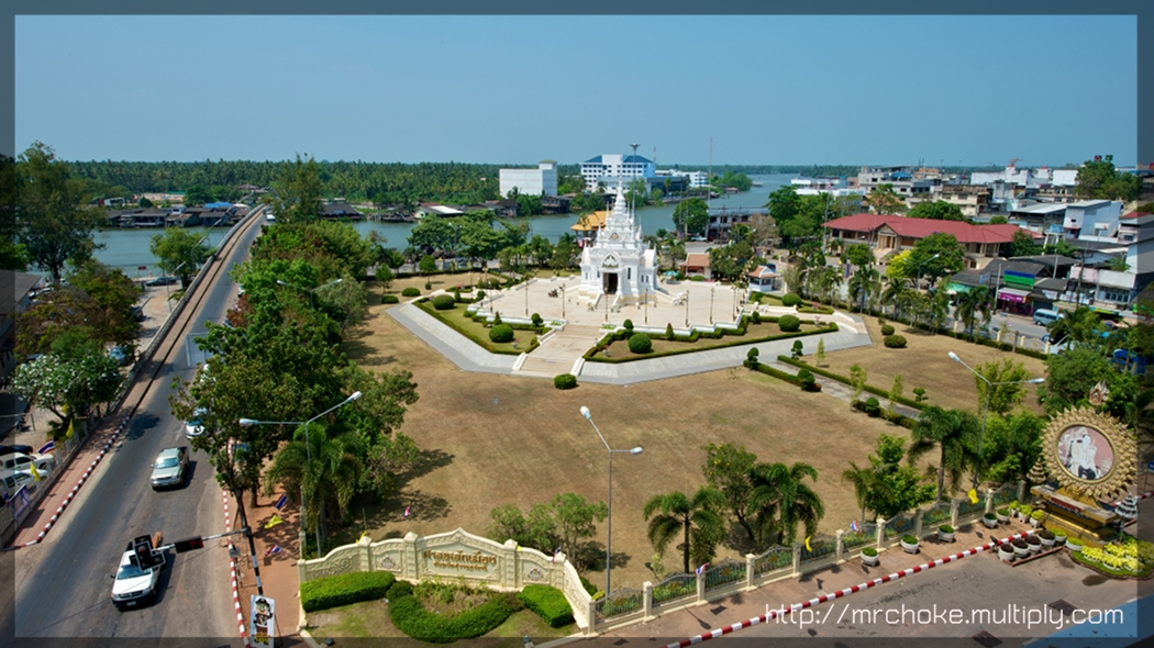 ศาลหลักเมืองสุราษฎร์ธานี